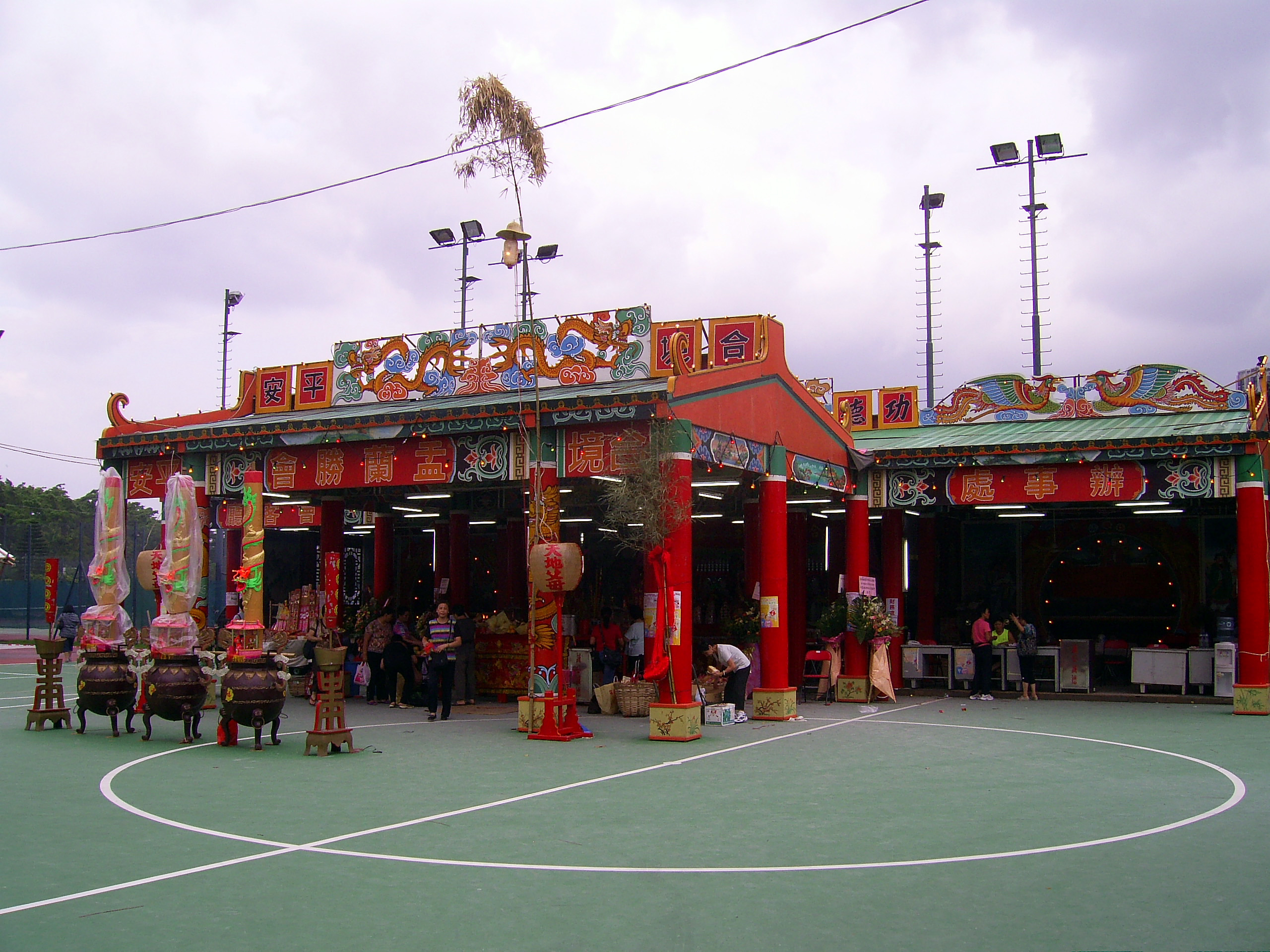 中文（香港）: 沙田盂蘭勝會